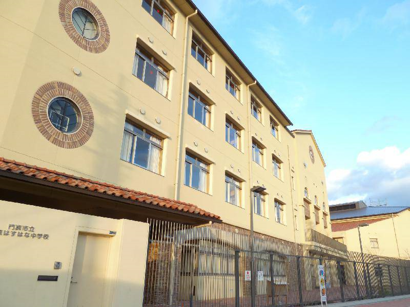 門真市立はすはな中学校門前